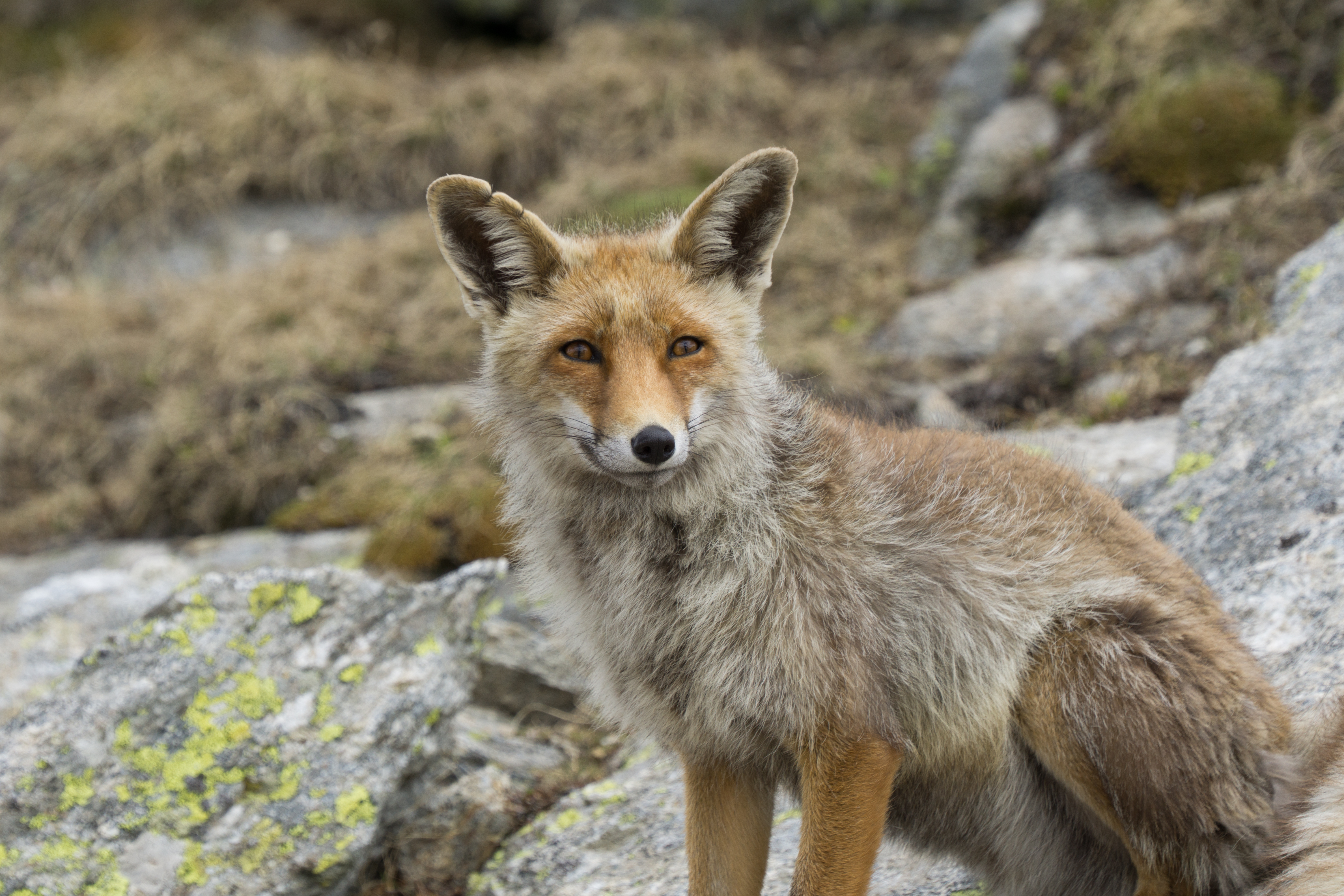 Parco nazionale del Gran Paradiso (Q847690)